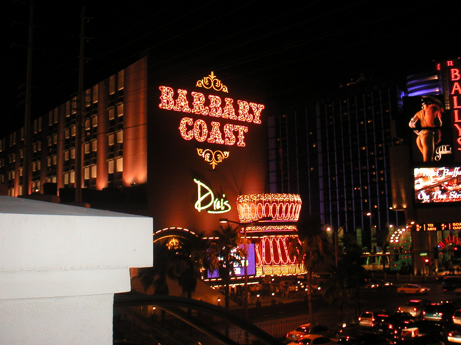 巴伯利海岸酒店夜景。